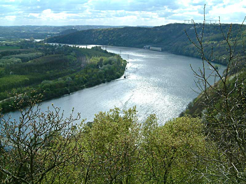 Panorama des Hengsteysees, der zwischen Dortmund, Hagen und Herdecke liegt, von der Hohensyburg aus fotografiert